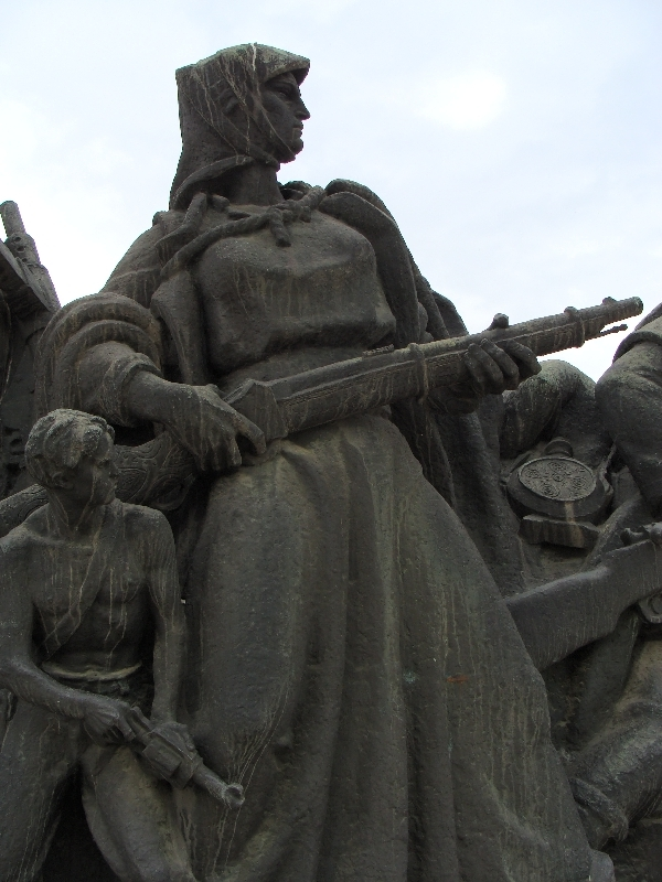 Partisan Monument. Skopje,Macedonia